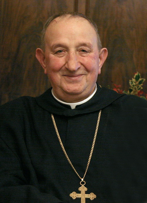 Abate Giustino Farnedi o.s.b.